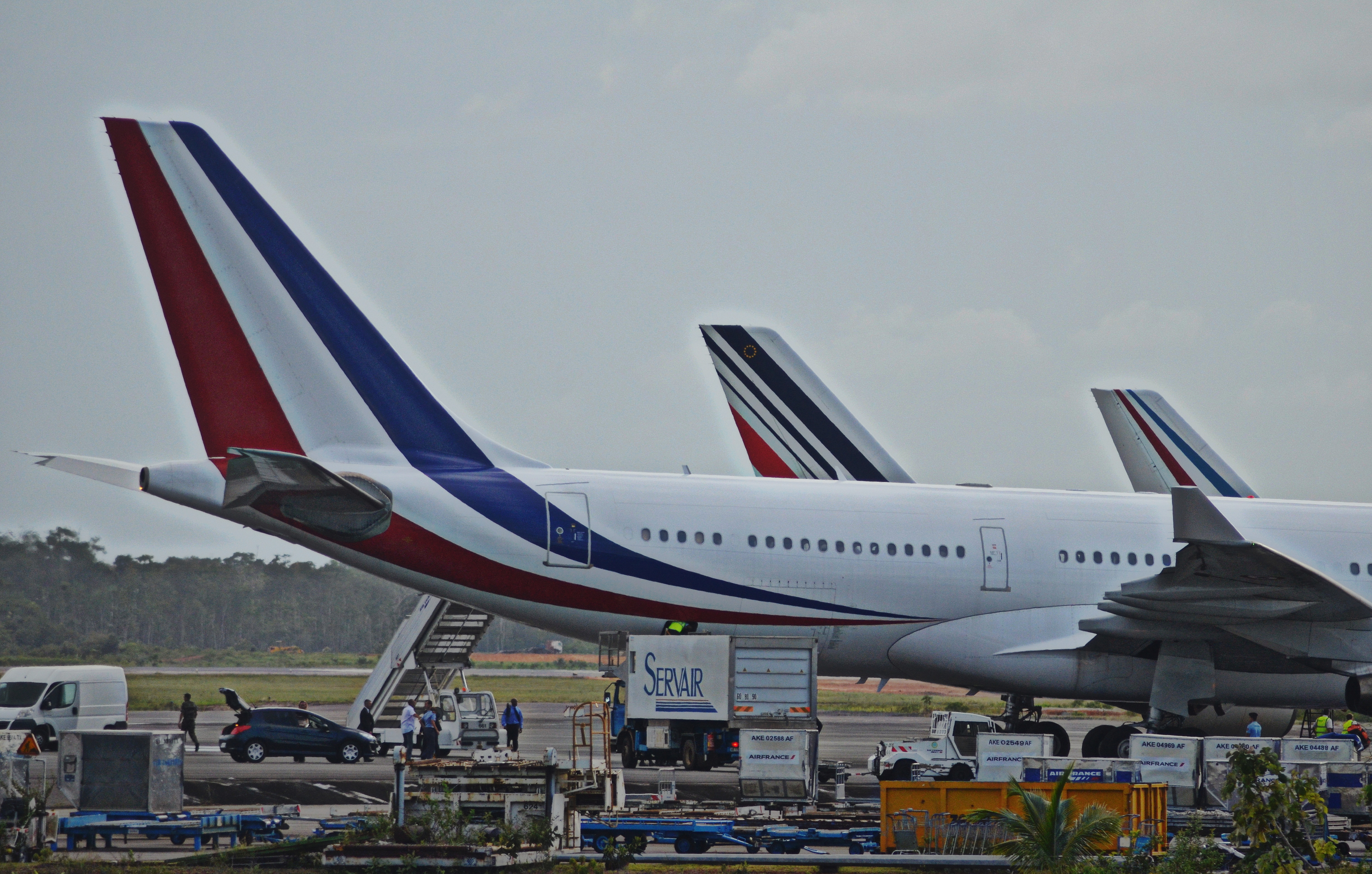 F-RARF & F-GLZH & F-RADA